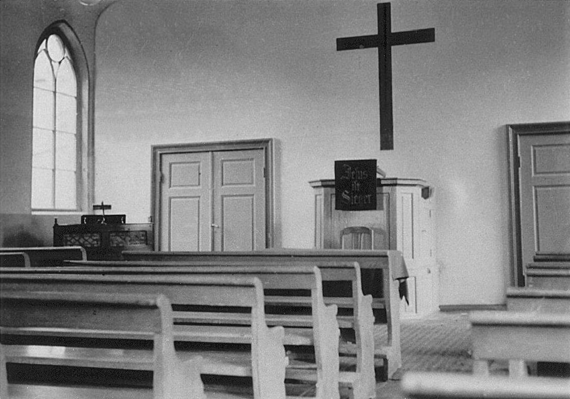 Inneres des Bethauses Jever um 1926